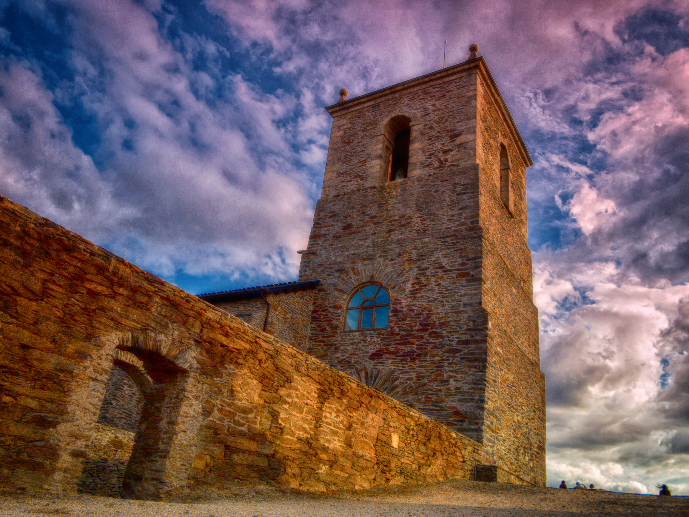 Santuario Virgen de la Peña (Congosto, León - España)